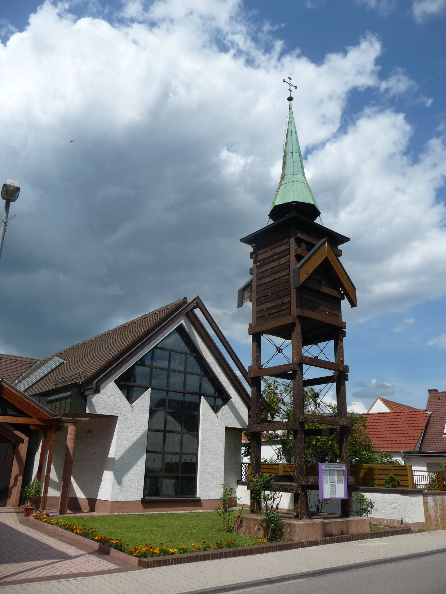 Bobstadt ist ein Stadtteil von Bürstadt im Kreis Bergstraße in Hessen.